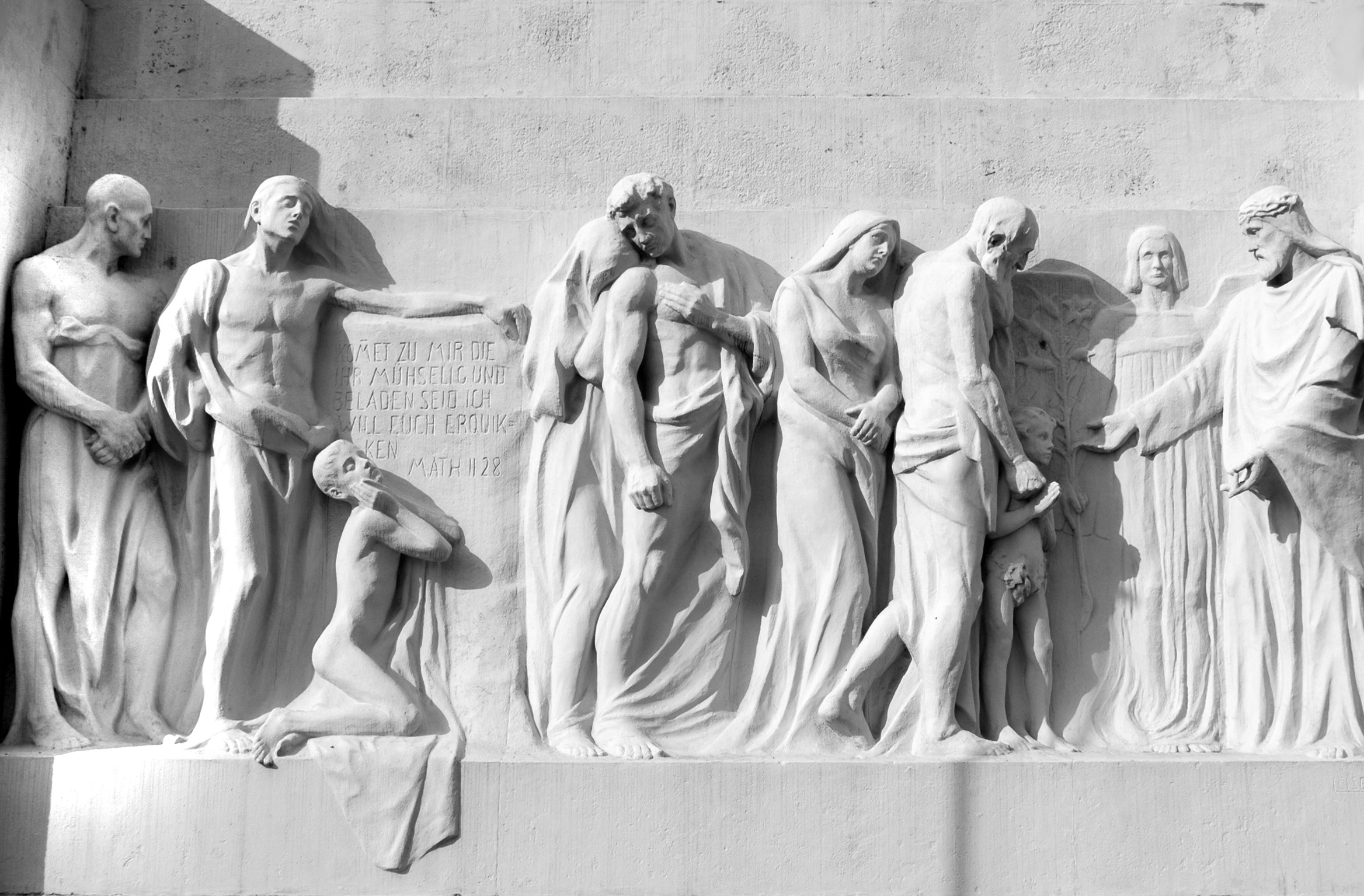 Georg Leisek (* 30. Juni 1869 in Wien; † 15. März 1936 in Maria Lanzendorf) war ein österreichischer Bildhauer. Pfeilerrelief 2.Tor Wiener Zentralfriedhof, "Christus empfängt die Verstorbenen".